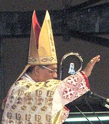 Mgr Ivan Dias